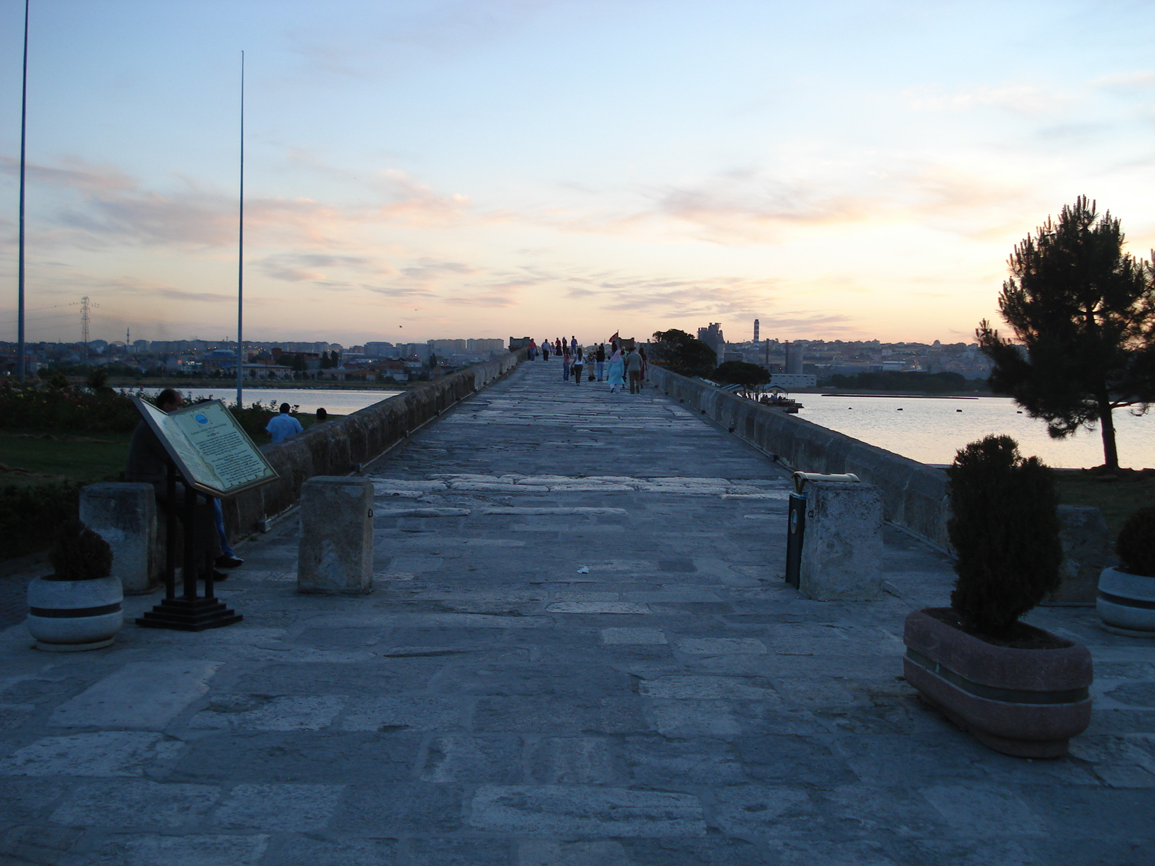 Kanuni Sultan Süleyman Bridge is built in Büyükçekmece, İstanbul by Mimar Sinan